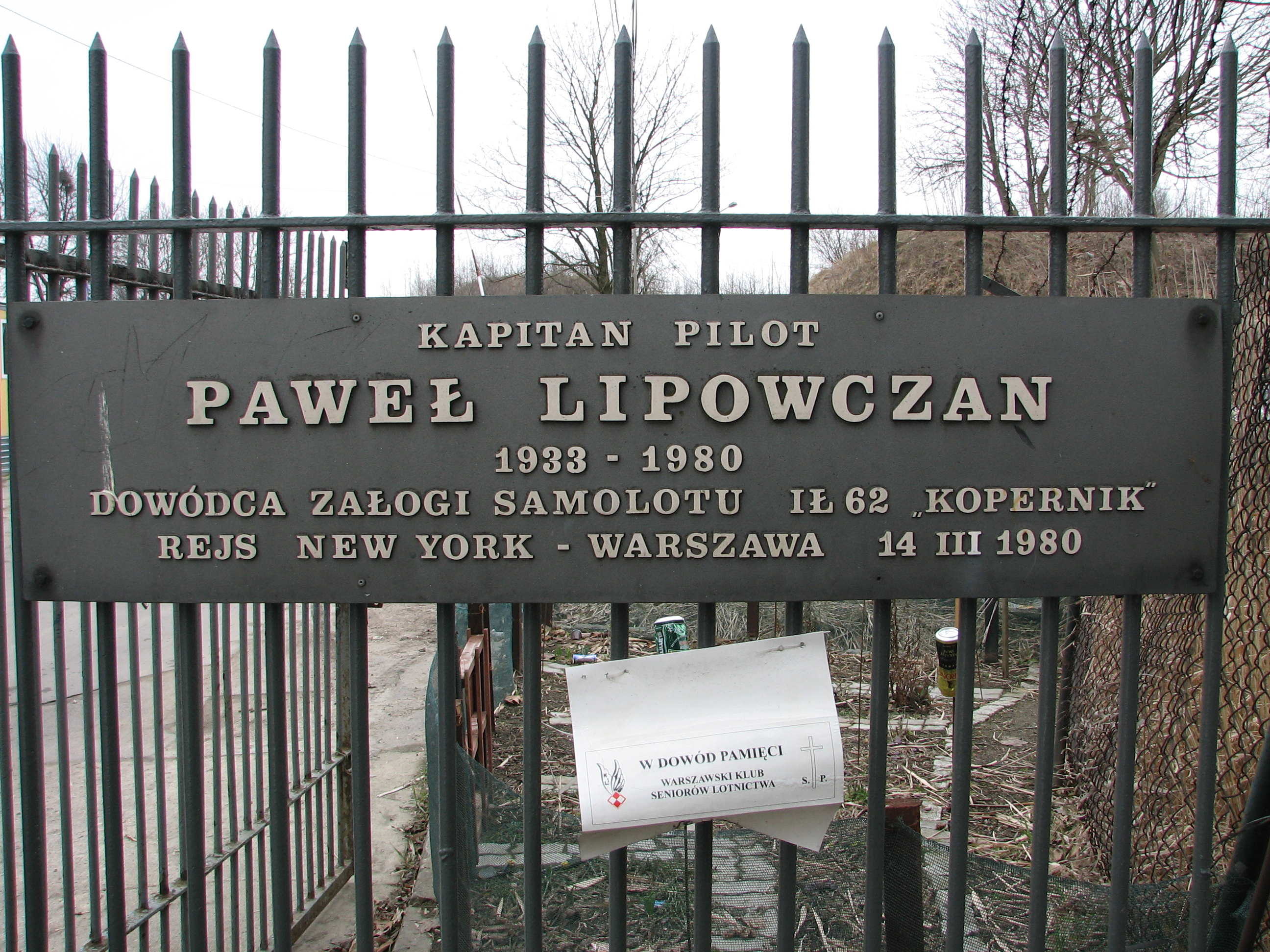 Tablica upamiętniająca kpt. Pawła Lipowczana - dowódcę załogi samolotu "Mikołaj Kopernik", który 14 marca 1980 roku rozbił się w Warszawie podczas podchodzenia do lądowania. Warszawa, ul. Lipowczana.